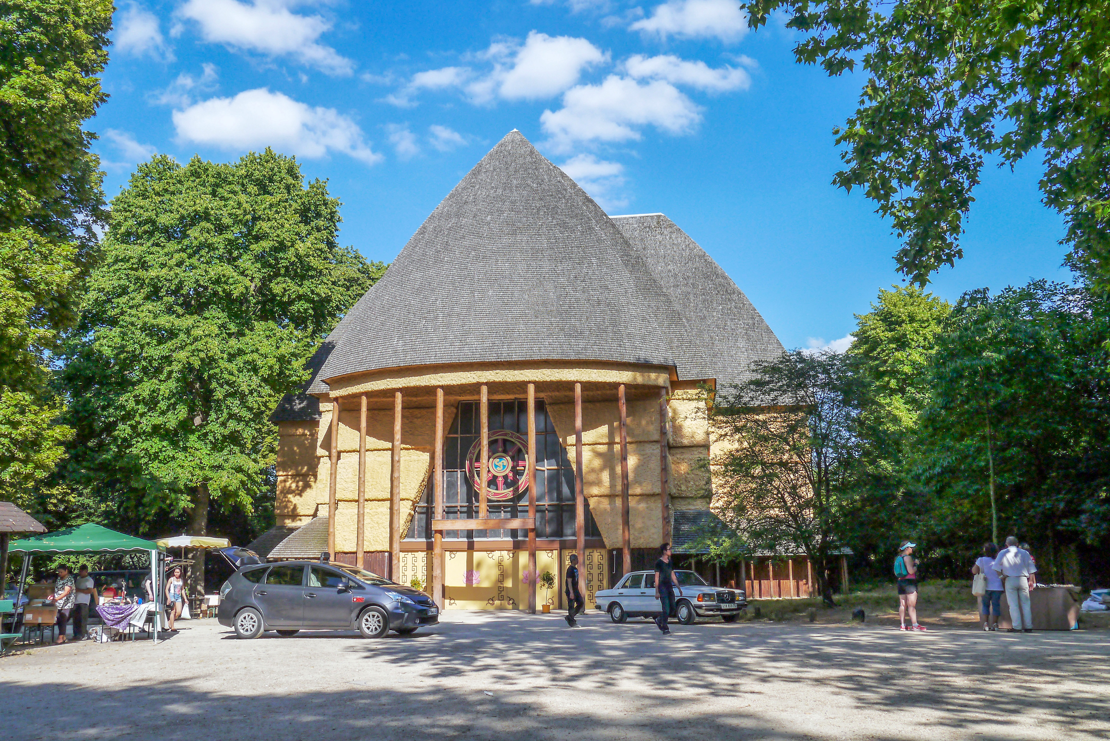 Vue générale de la pagode de Vincennes, exceptionnellement accessible lors d'un festival. .